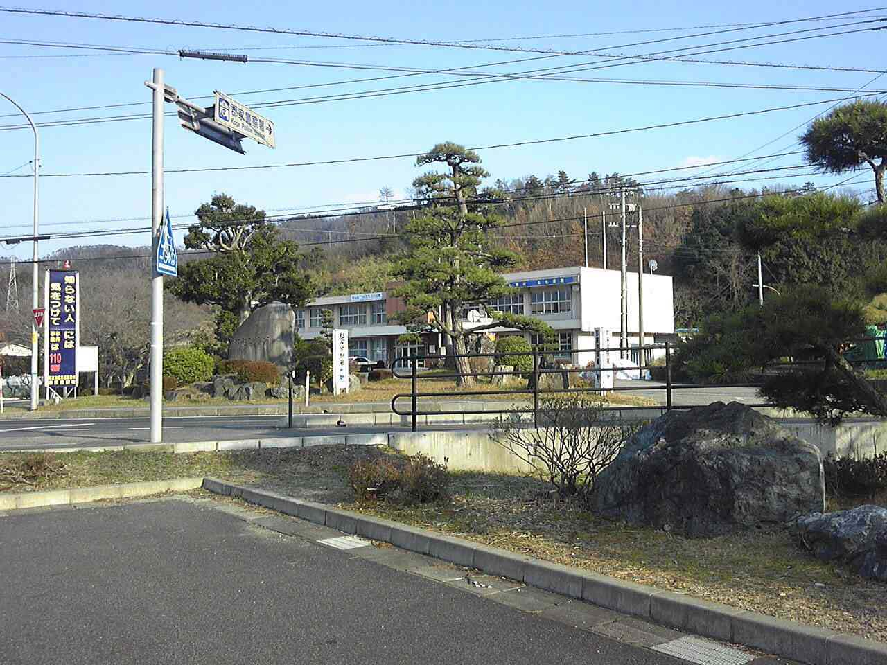 郡家警察署